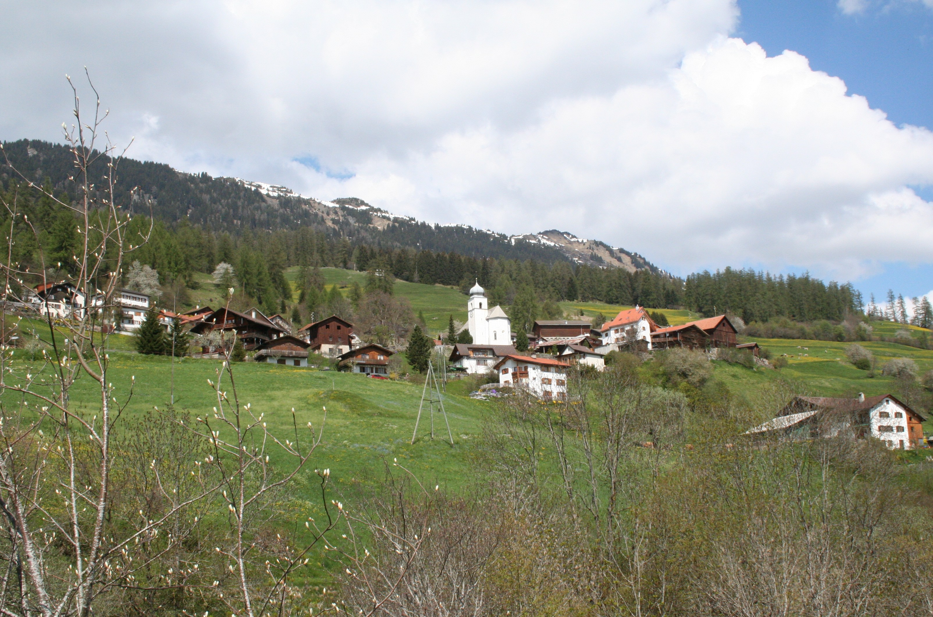 innere Mauerecke